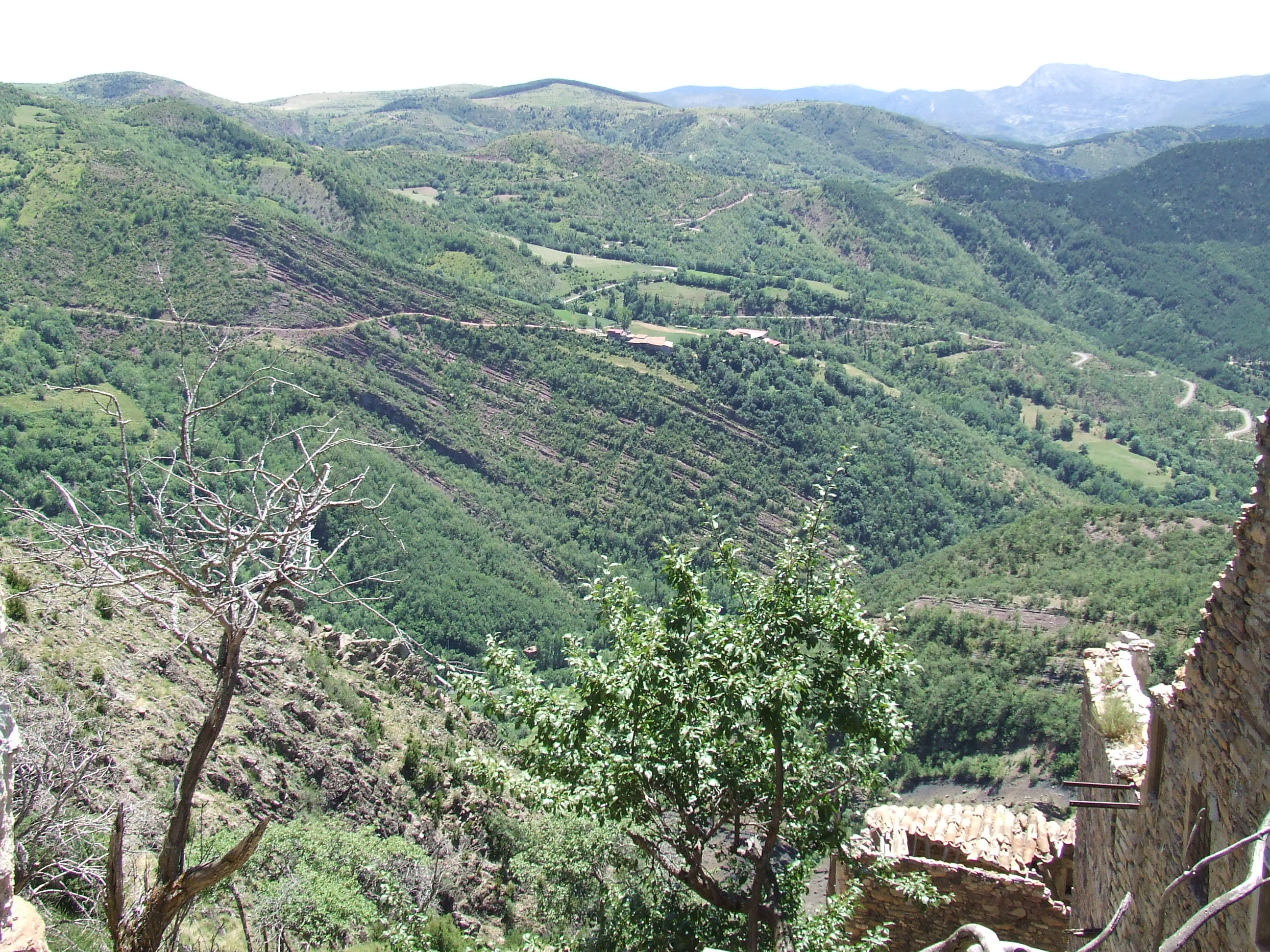 El barranc de Peranera a Castellars (Malpàs, el Pont de Suert)